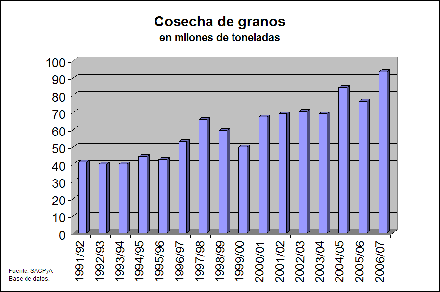 Argentina. Evolución de la cosecha de granos (cereales más oleaginosas) entre 1991/1992 y 2006/2007 (en millones de toneladas). Evolution of grain production (cereals and oil plants) between 1991/1992 and 2006/2007 (in billions of tons).